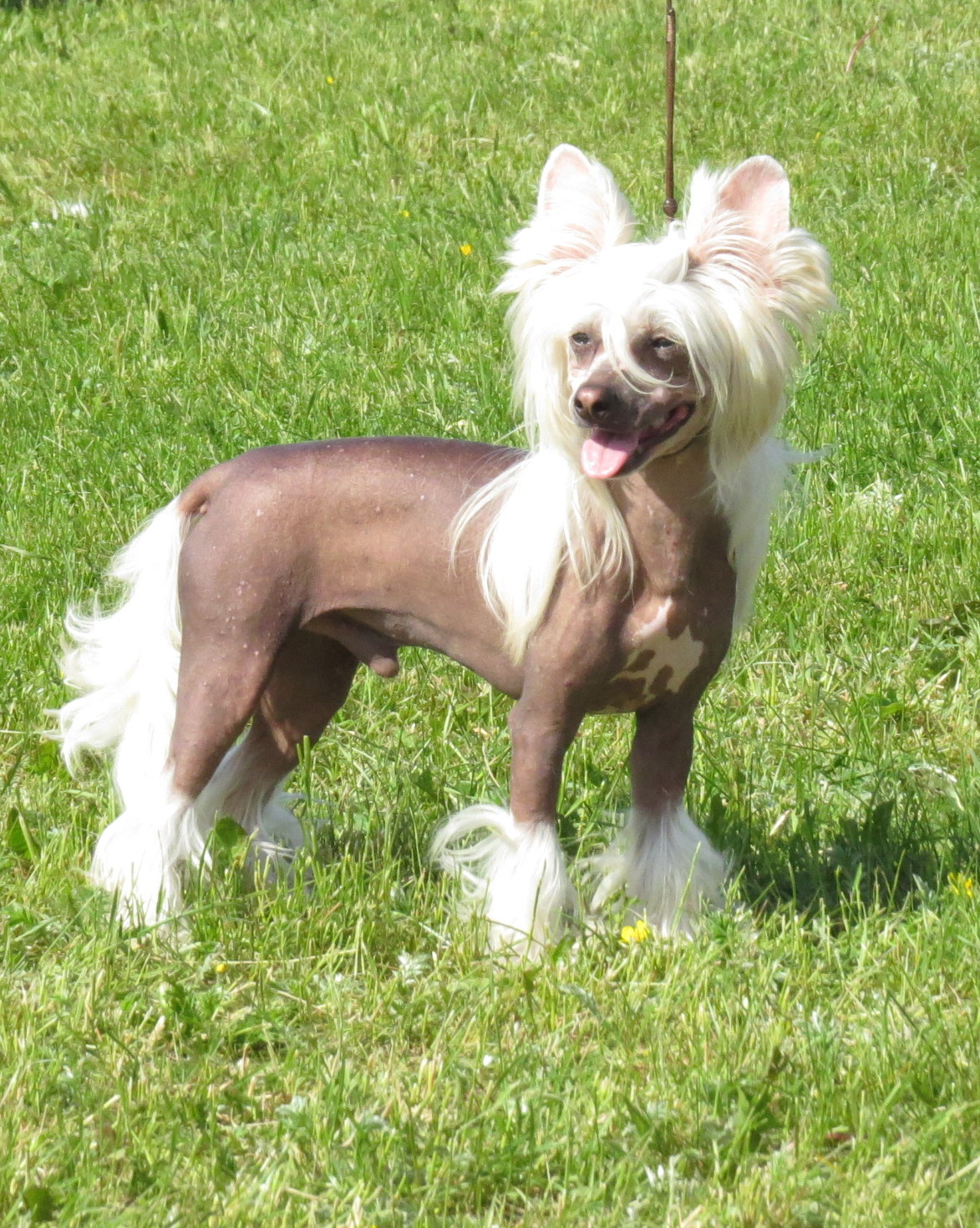 Moletai May 2014